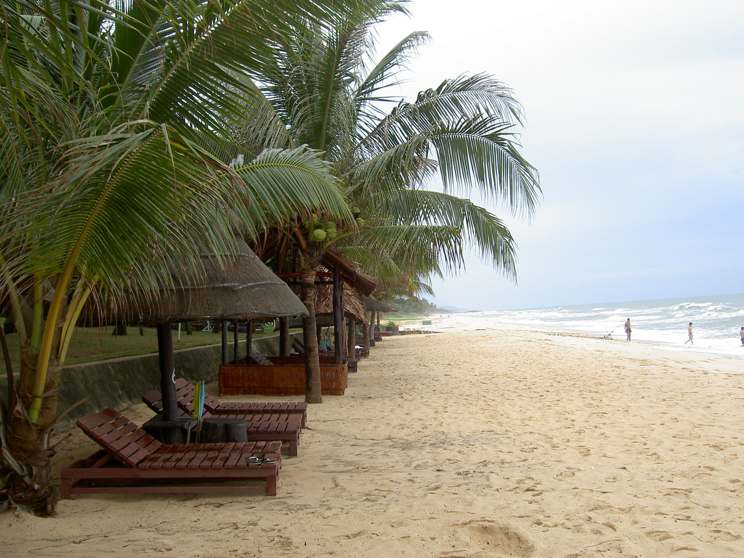 La plage à Phu Quoc